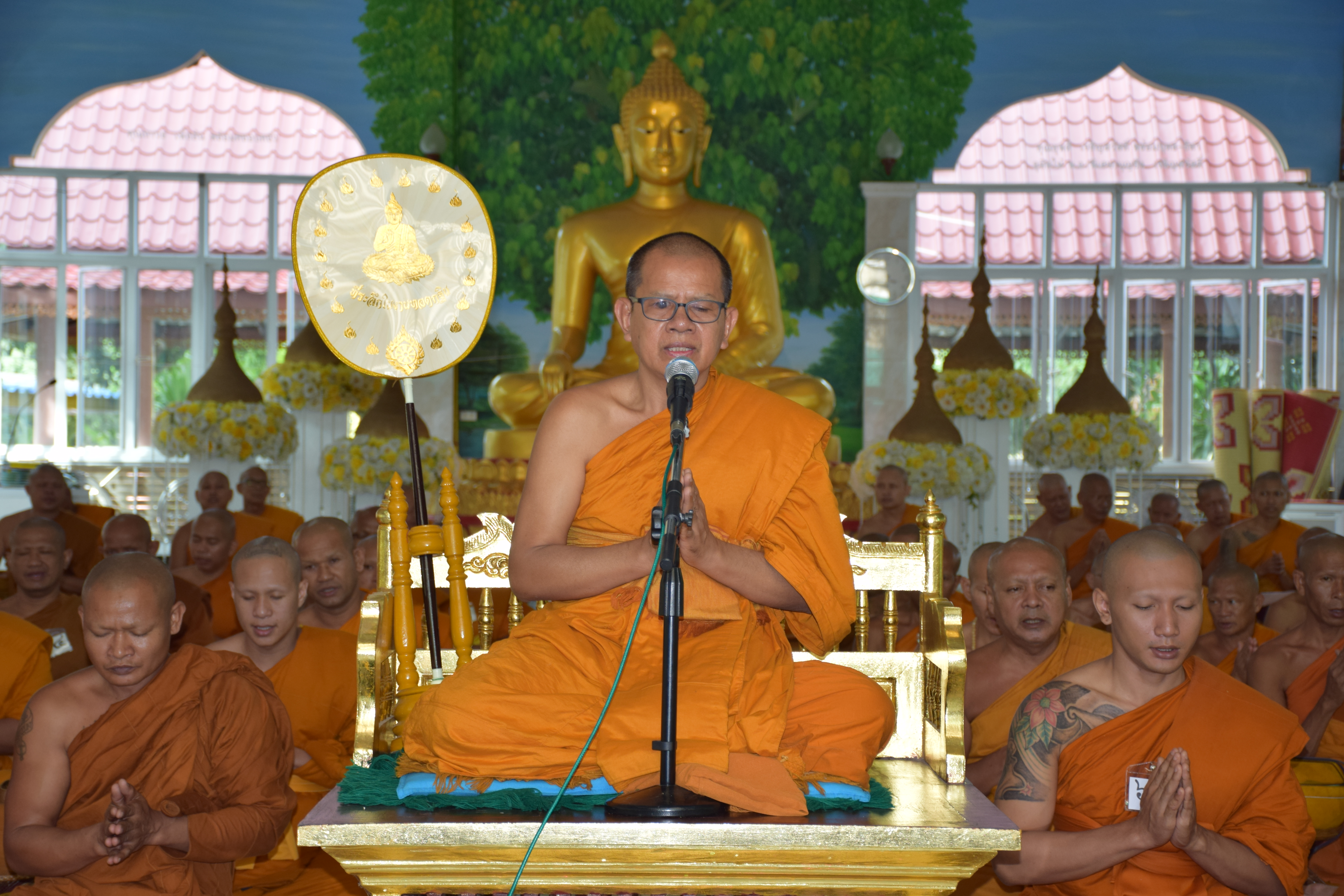 พระครูสุธีธรรมากร